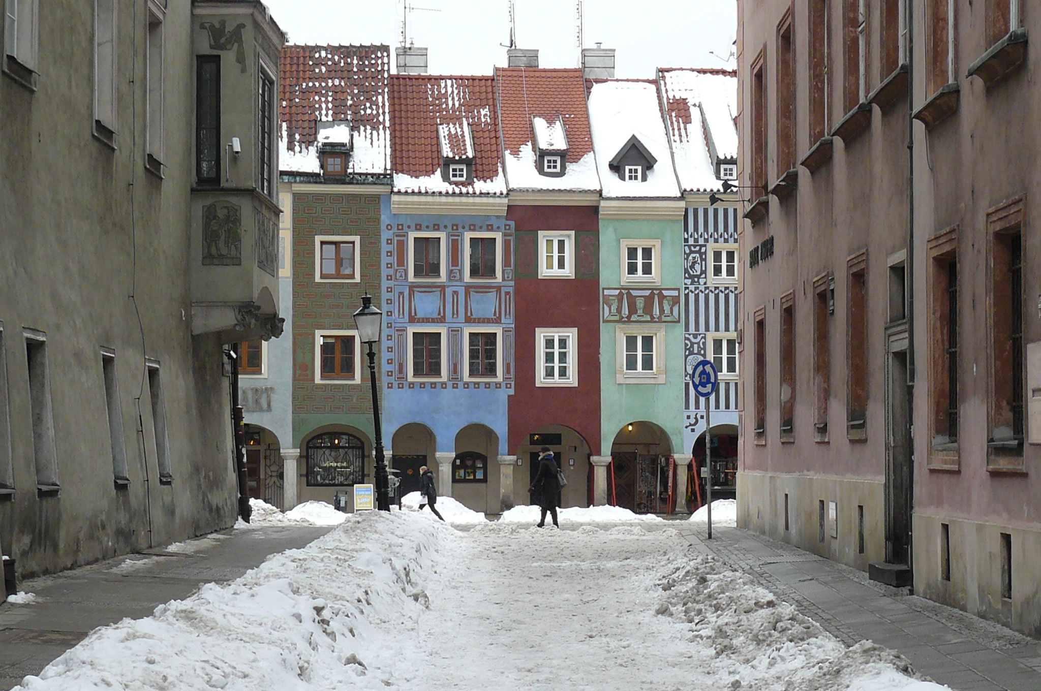 Poznań - ul. Woźna i Stary Rynek.